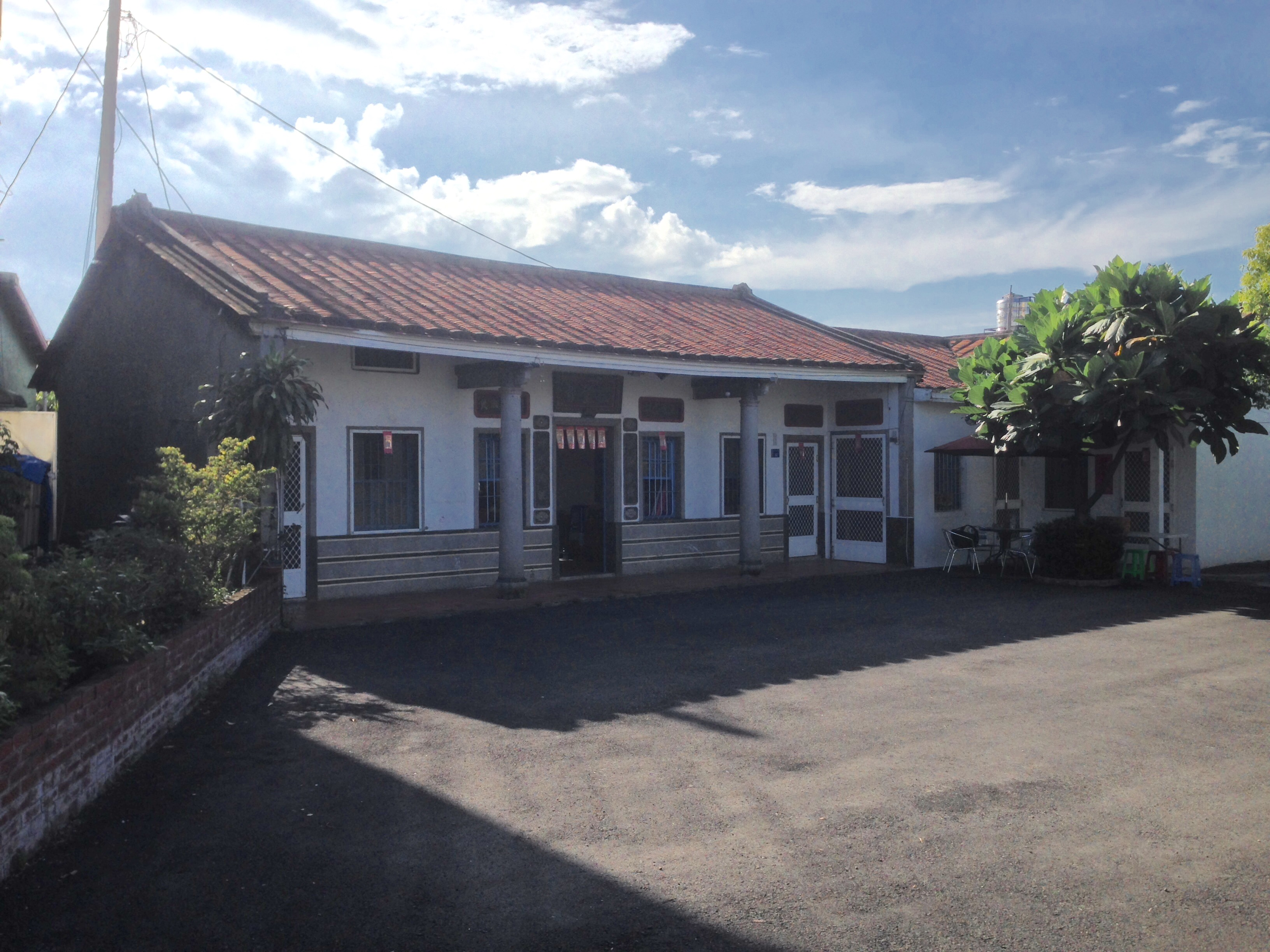 美和村曾家夥房